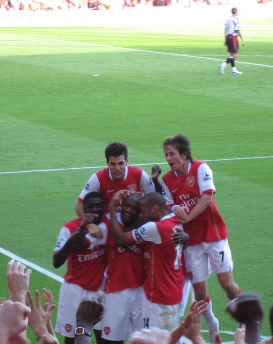 Cesc Fabregas, cropped